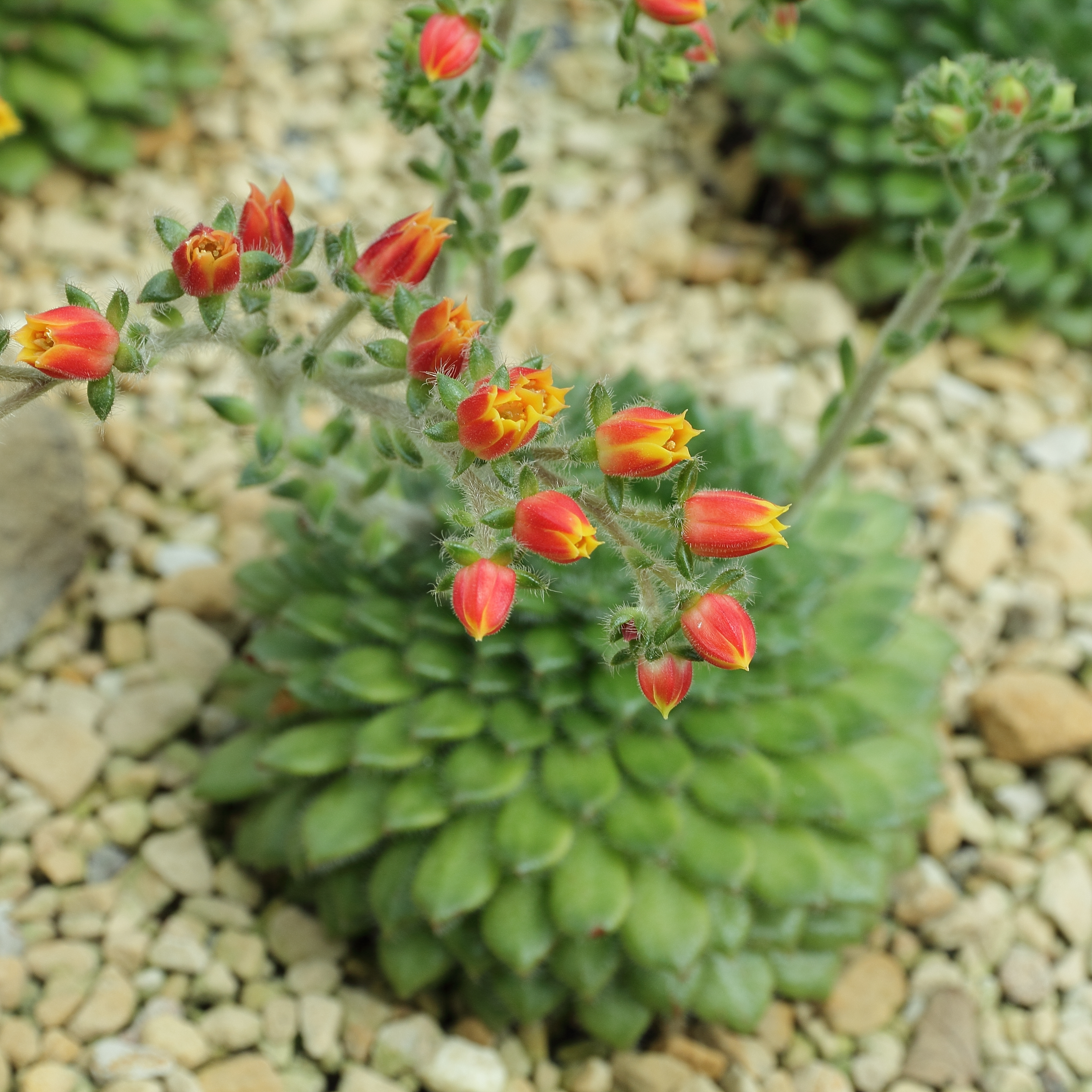 Echeveria setosa i Bergianska trädgården.